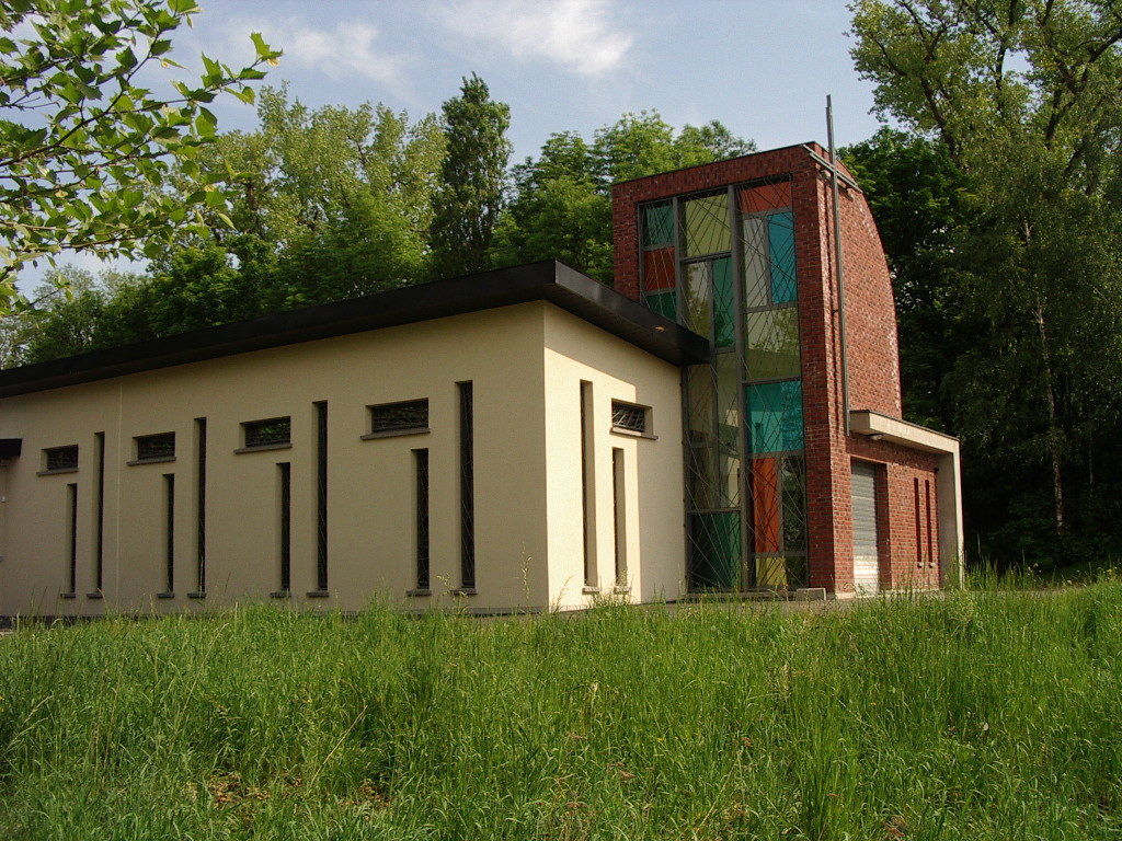 Eglise Saint Eloi Avion